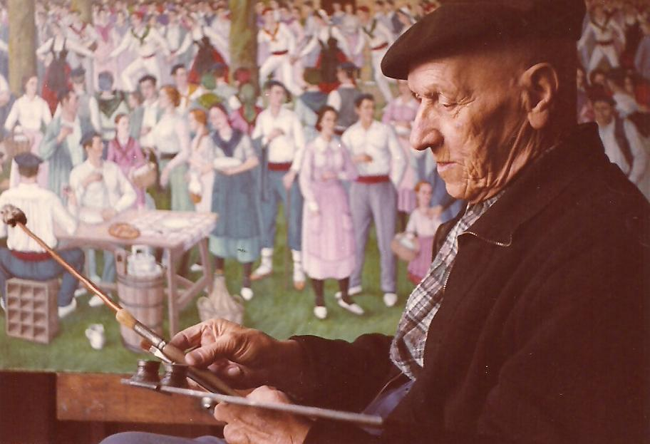 José Arrue en 1971 fotografiado por Gonzalo Gómez Arrue